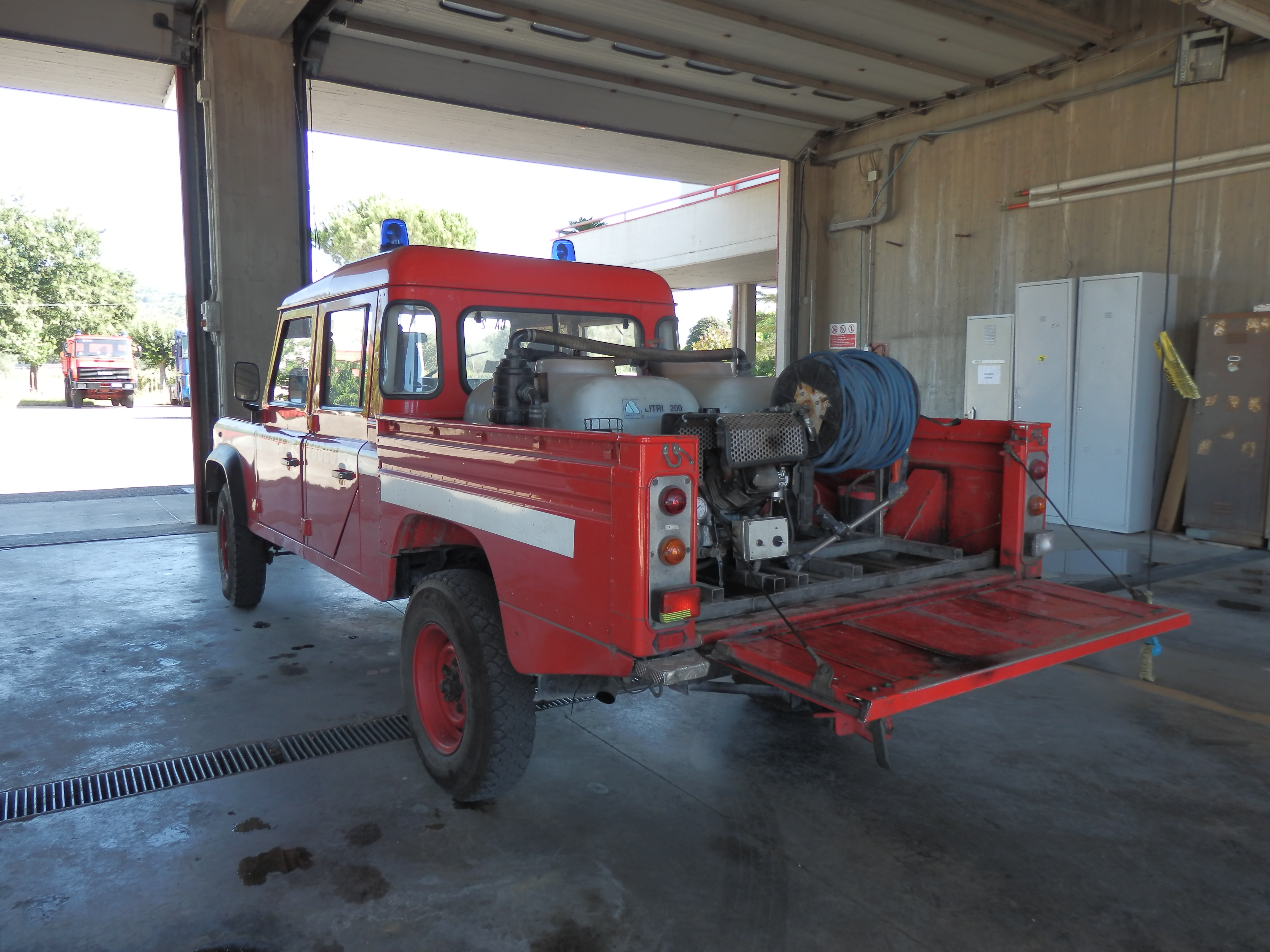 Land Rover Passo Lungo per incendi boschivi, Comando Provinciale dei Vigili del Fuoco di Pisa distaccamento di Cascina.